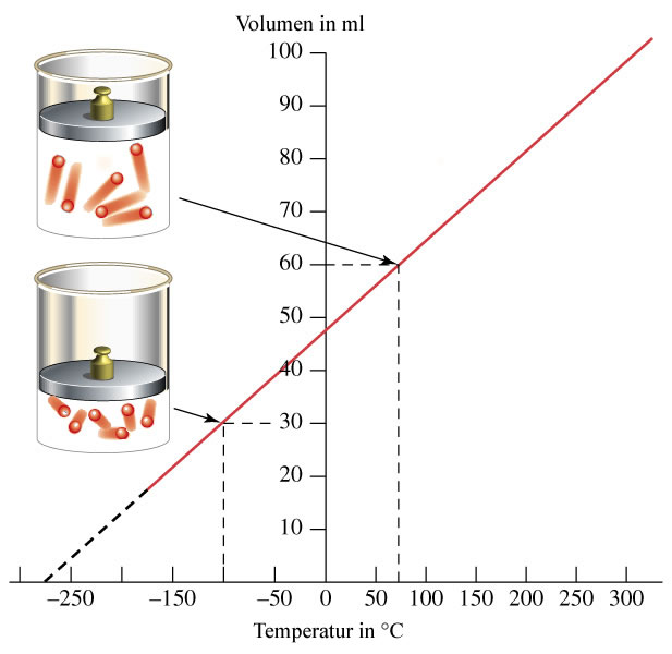 Diagramm zur Darstellung des Gesetzes von Gay-Lussac